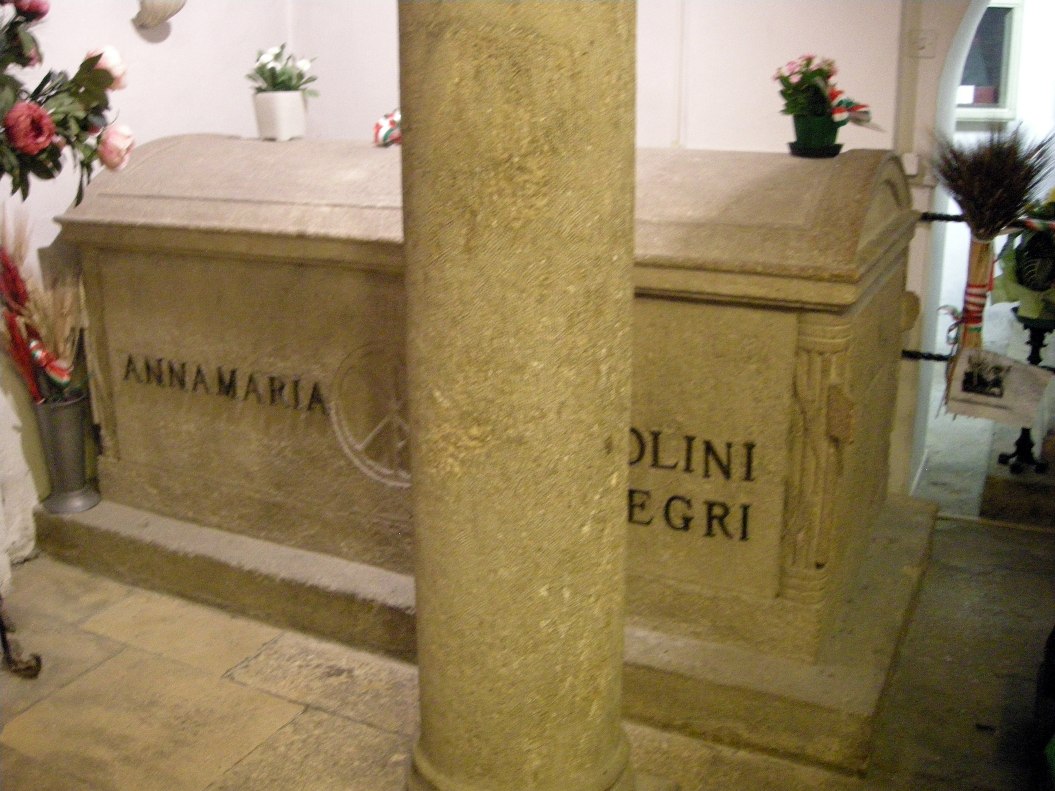 Cripta del cimitero di San Cassiano a Predappio, tombe della famiglia Mussolini